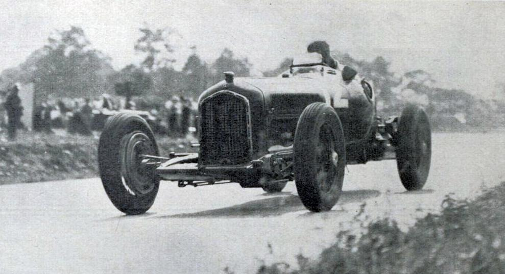 Louis Chiron vainqueur du Grand Prix de l'ACF 1934, sur Alfa Romeo P3 Ferrari.